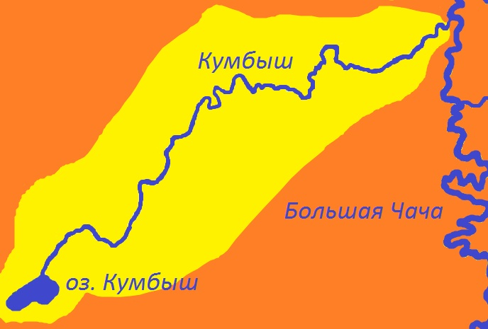 Бассейн реки Кумбыш (карта).